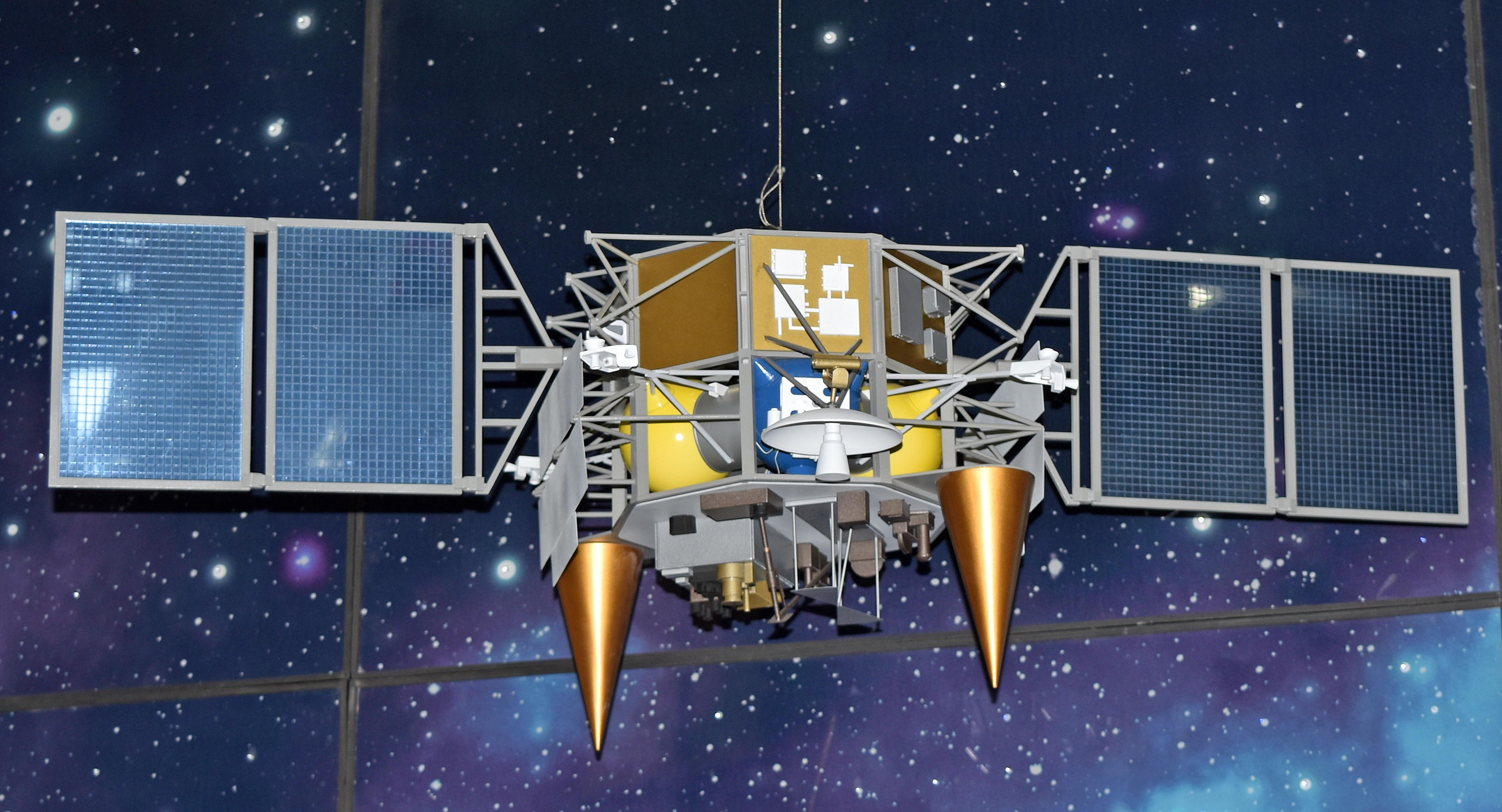 Orbiteur lunaire russe Luna-Resurs (Luna 26) Salon du Bourget 2015, Paris